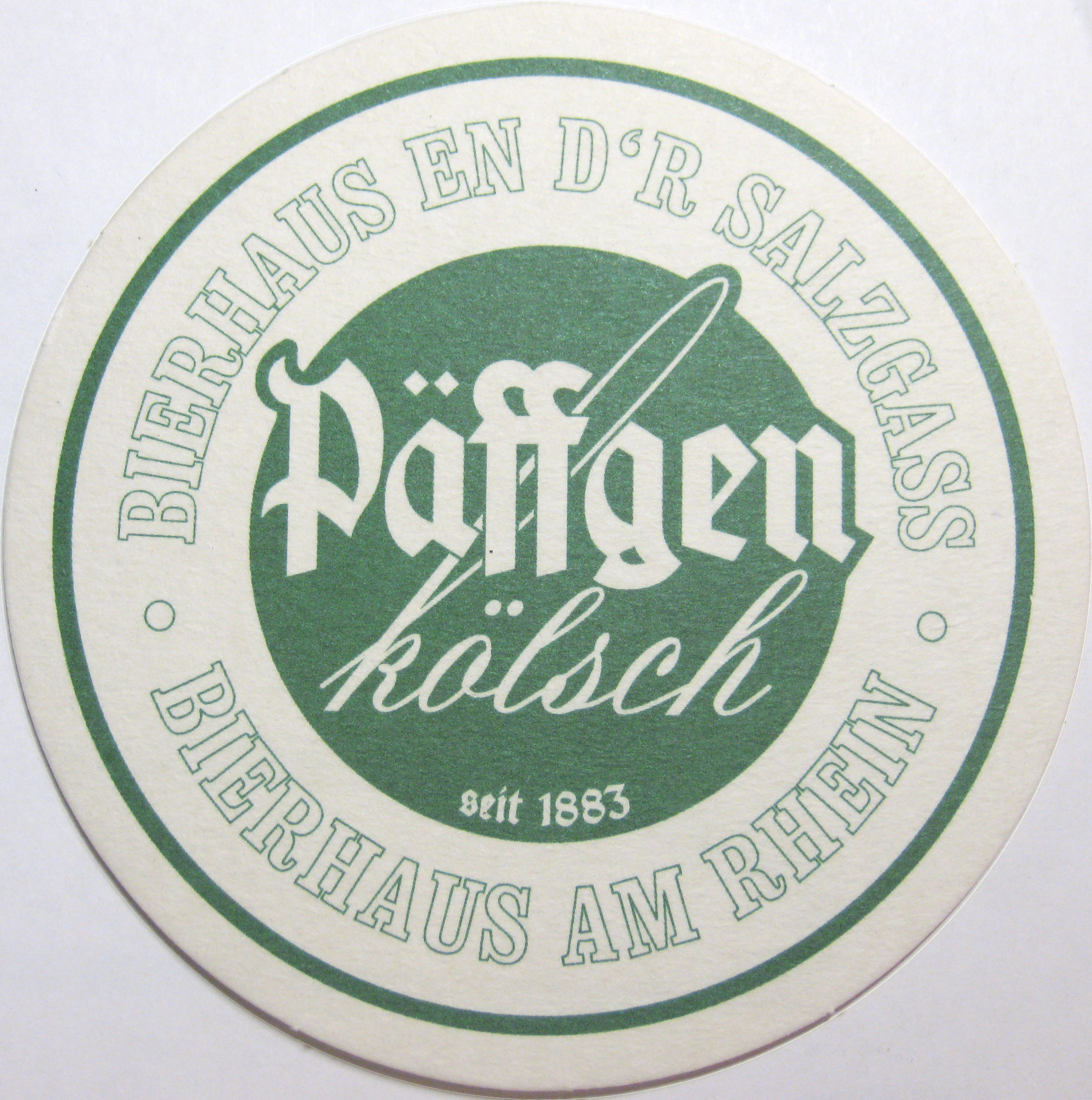 Kölsch Bierdeckel